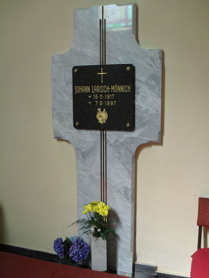 Náhrobek Johanna Larische - Mönnicha ve fryštátském zámeckém kostele